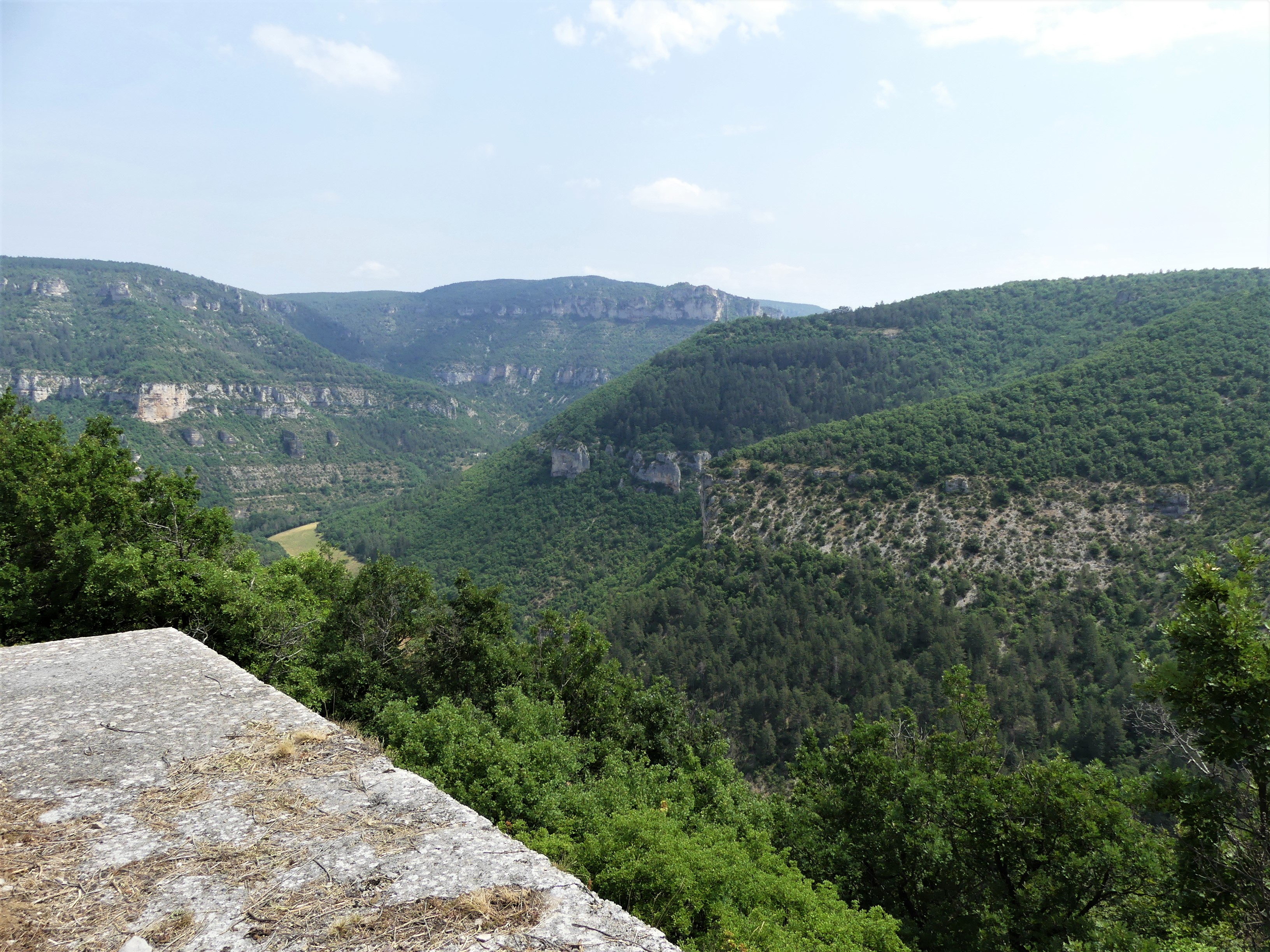 Les gorges de la Dourbie vues depuis le belvédère de la route départementale 809, Millau, Aveyron, France.